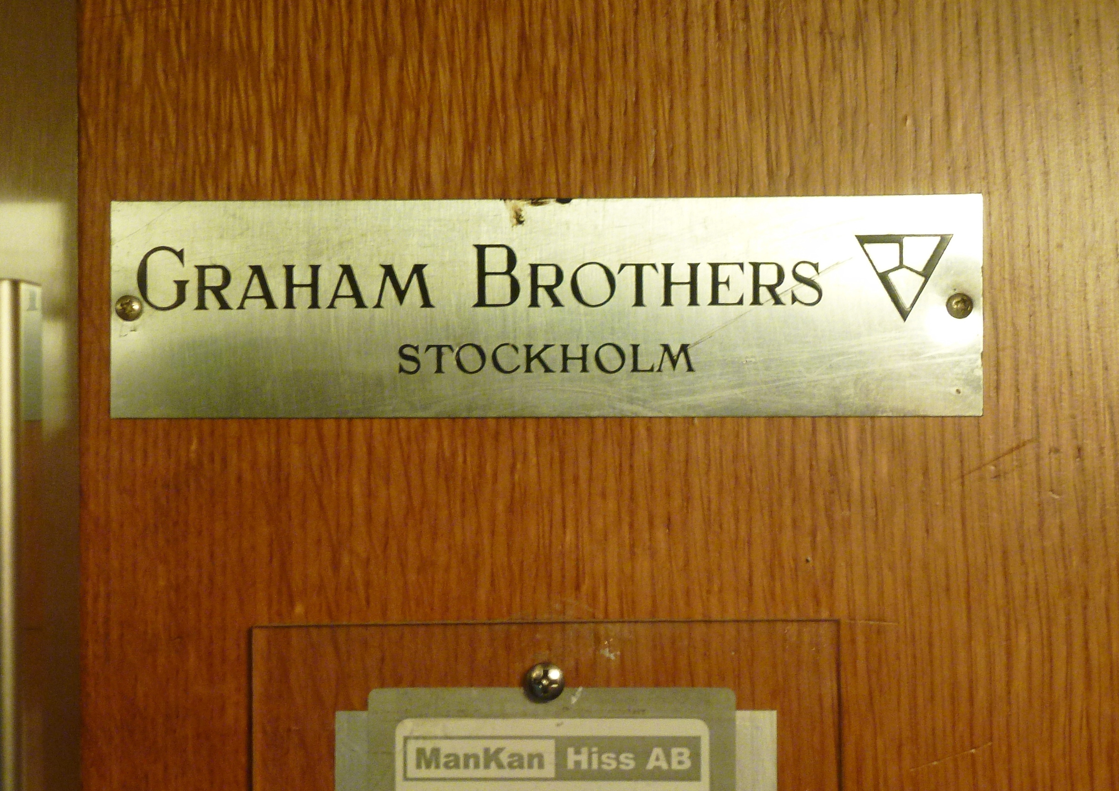 Skylt Graham Brothers i hissen för Stockholms stadsarkiv